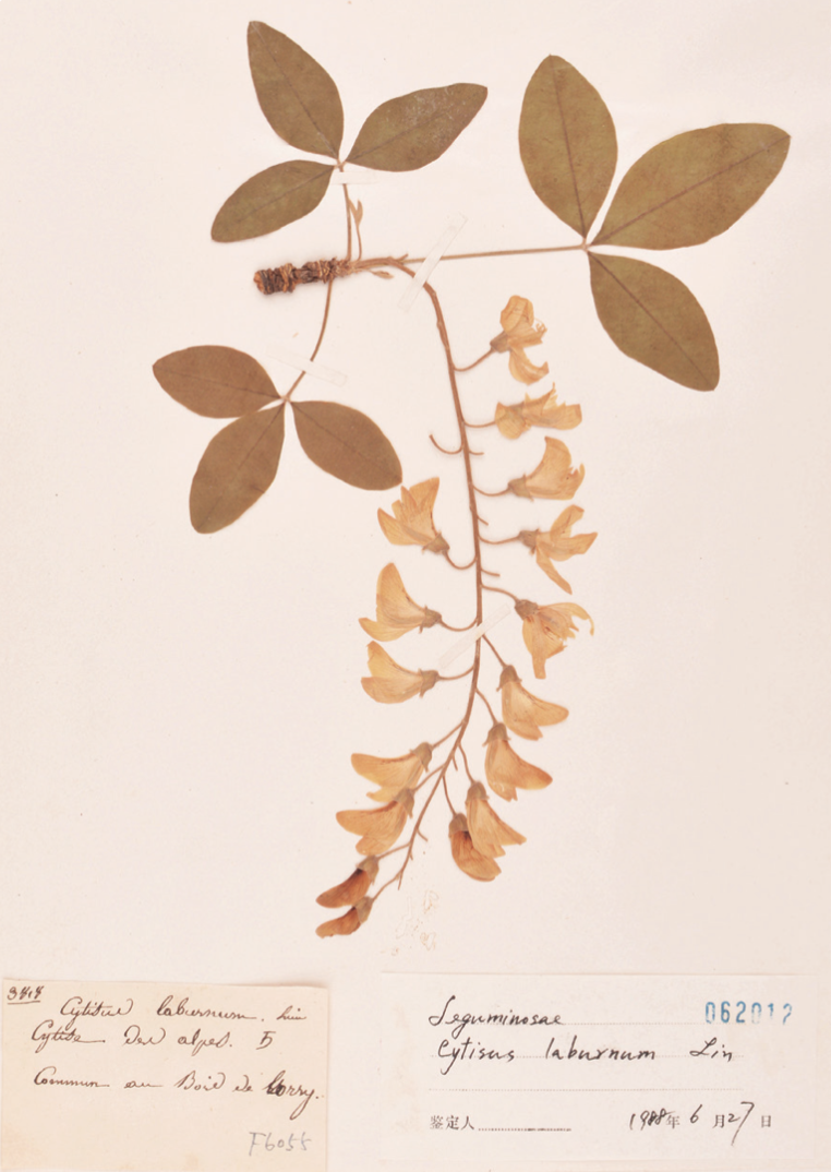 中文（中国大陆）: 法国北部采集的金链花标本